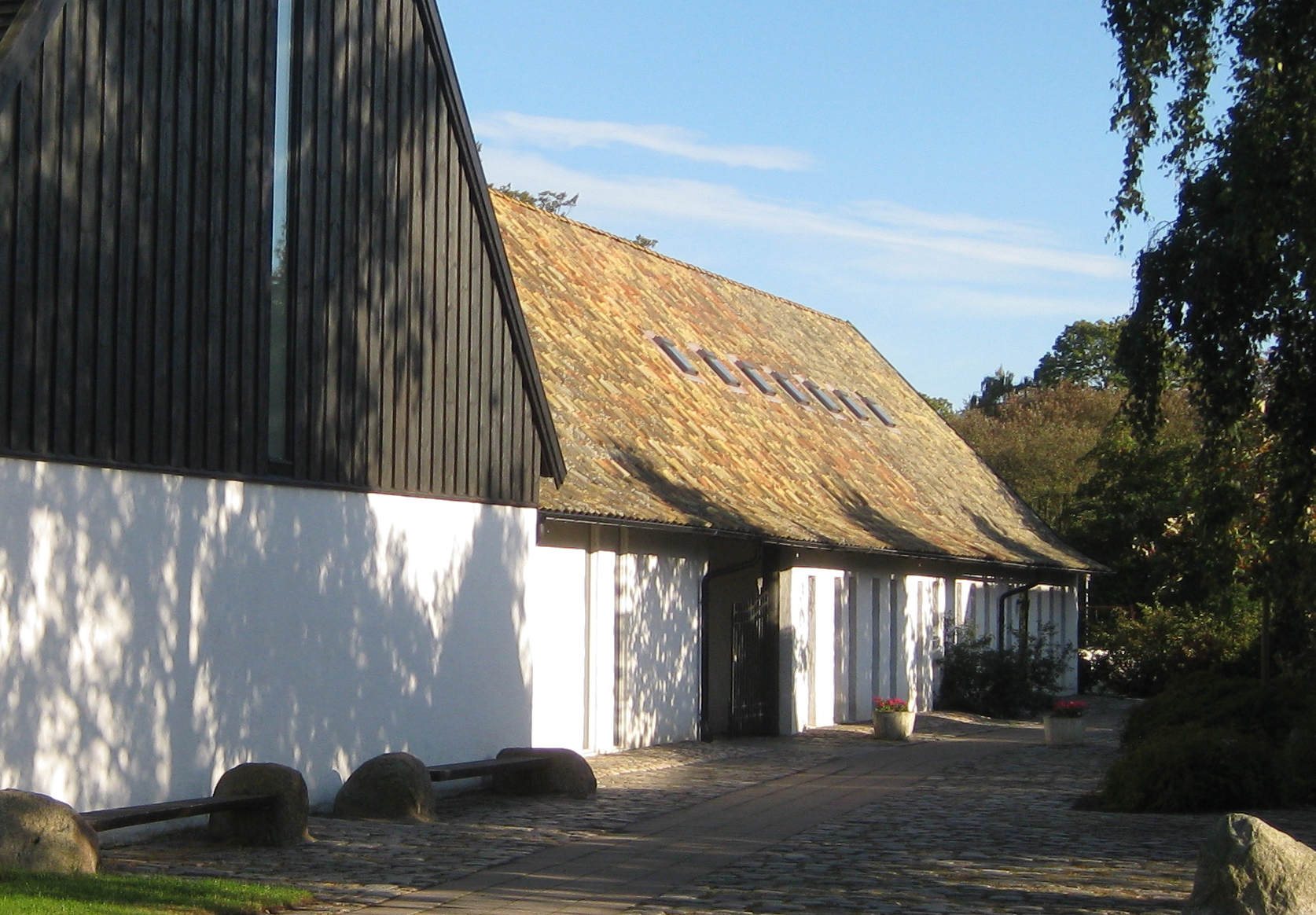 Bergakyrkan i Bjärred, Skåne